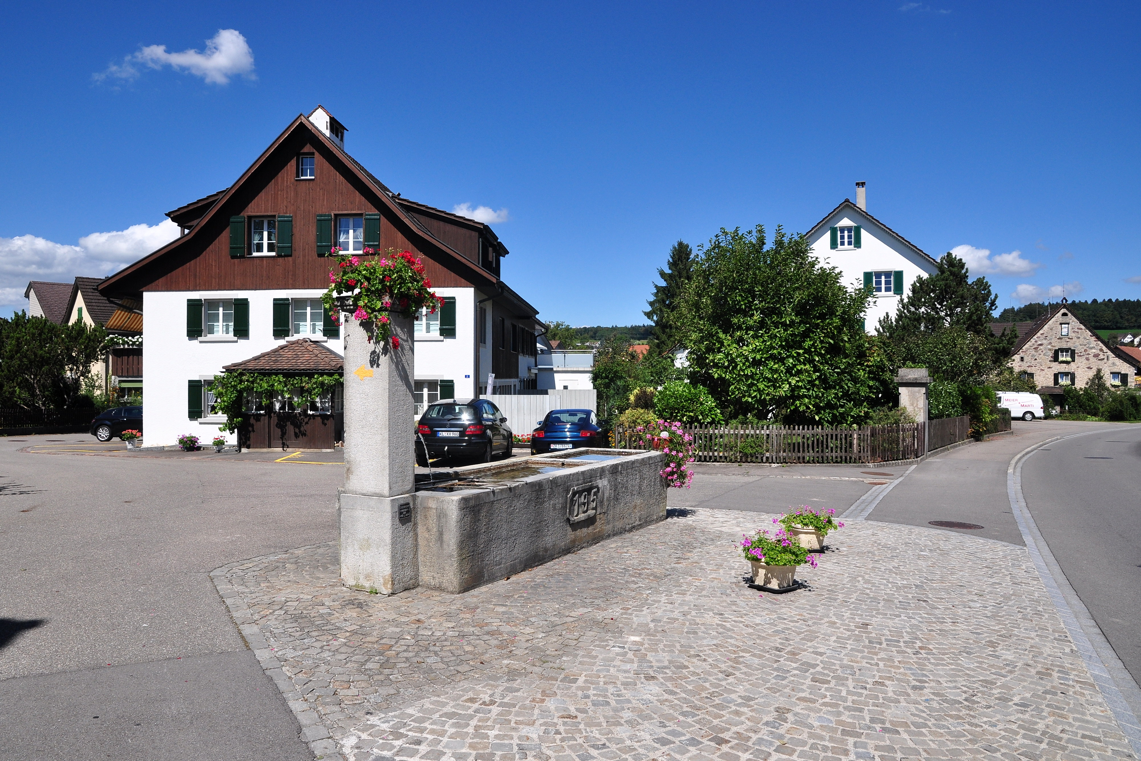 Dorfstrasse in Regensdorf-Watt (Switzerland)